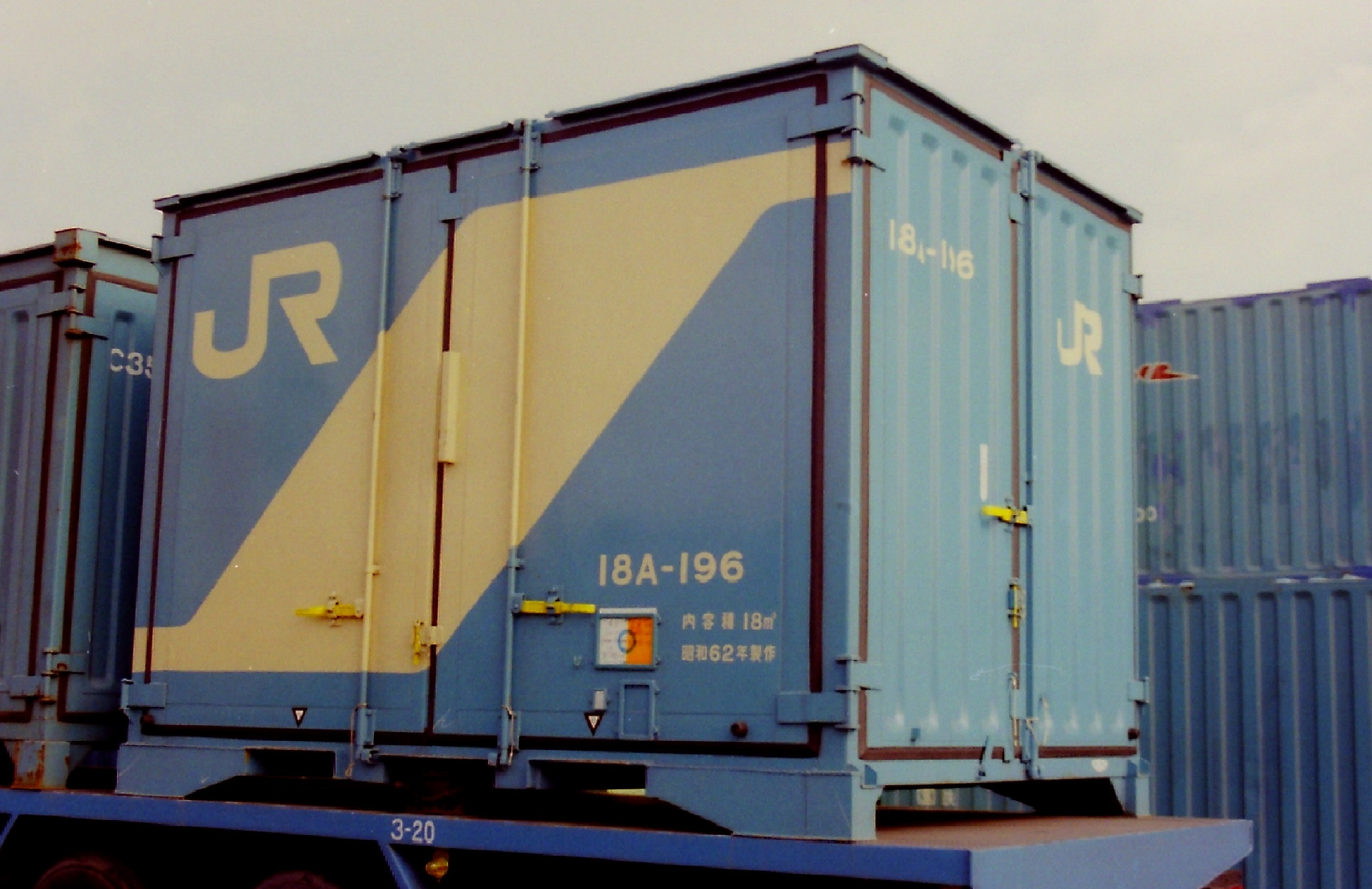 撮影地＝【大阪／元、梅田貨物駅】